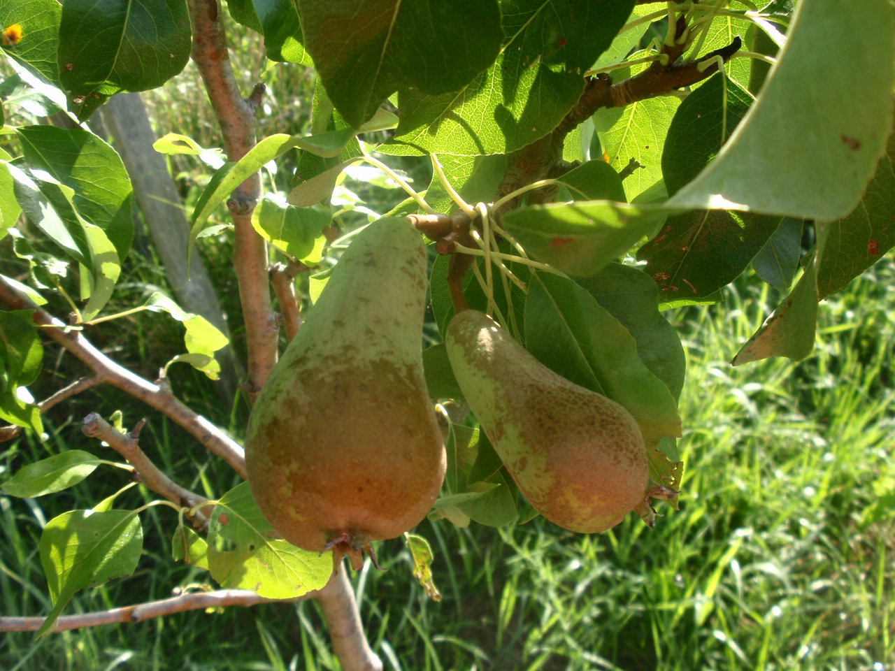 Konference hrušeň (Conference paer)